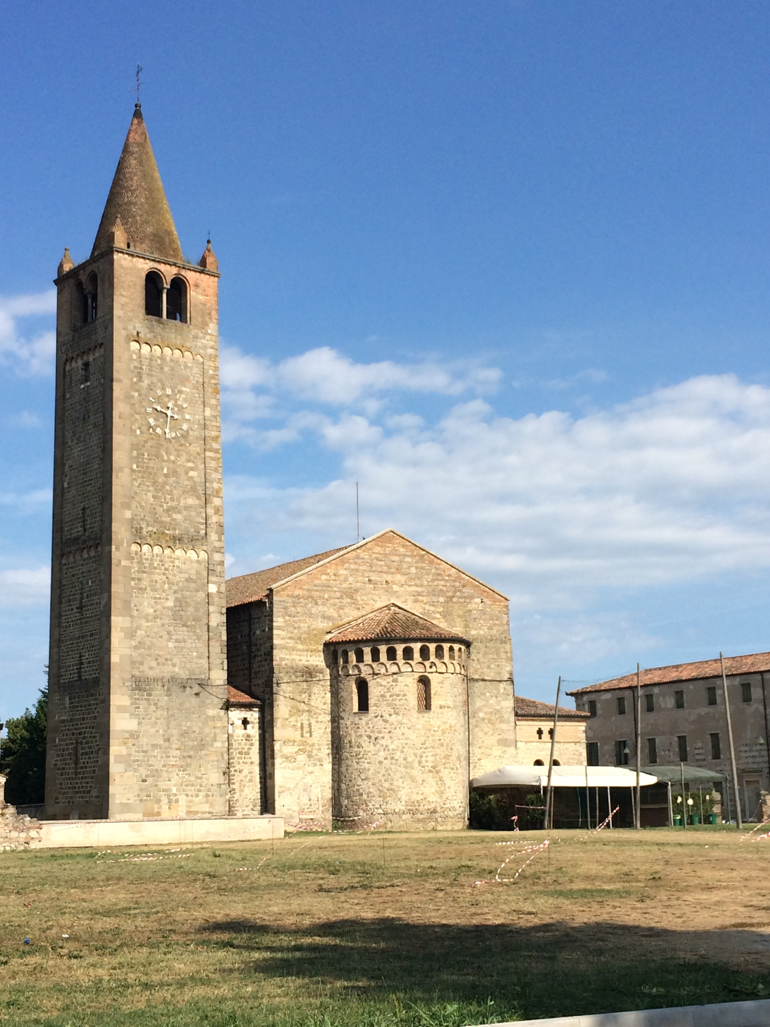 Carrara Santo Stefano, frazione di Due Carrare: chiesa di Santo Stefano primo martire, già parte dell'abbazia benedettina di Santo Stefano di Carrara.